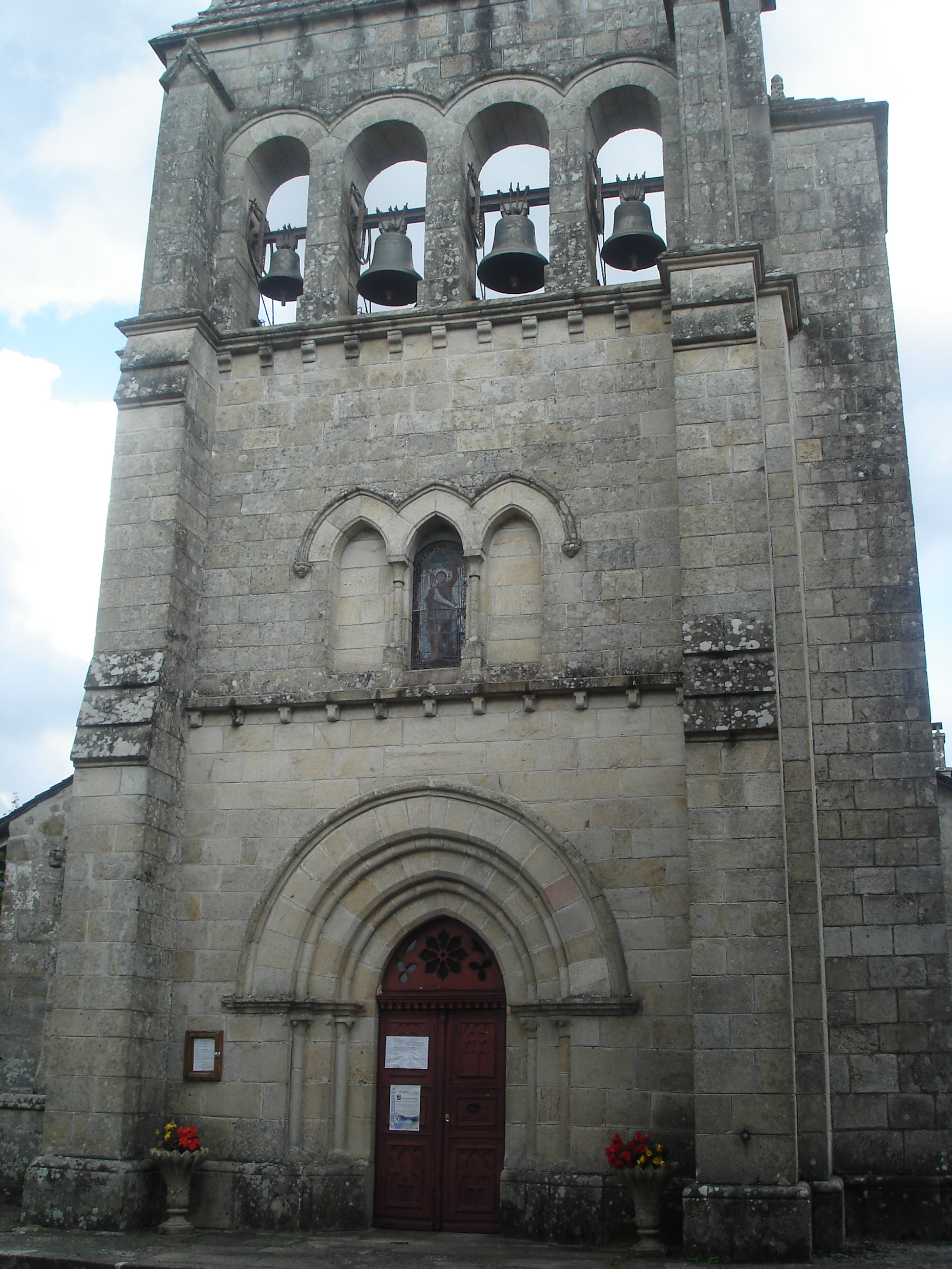 Eglise de Saint-Martin-la-Méanne, commune française, située dans le département de la Corrèze et la région Limousin (France).